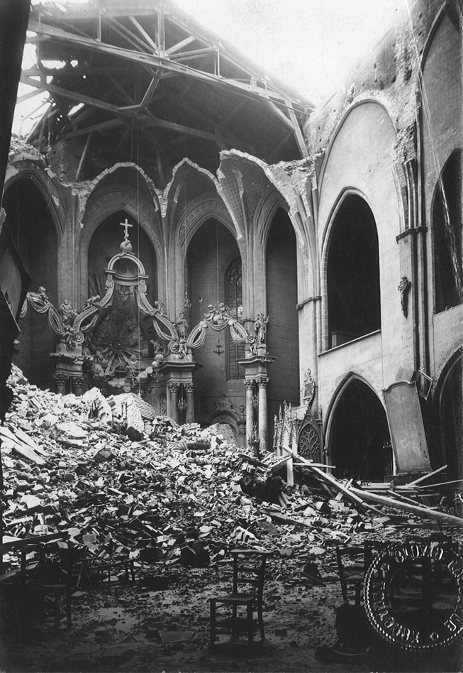 Eglise Notre-Dame-de-la-Dalbade, rue de la Dalbade.1926.Vue intérieure de l'église après l'effondrement de son clocher. Le choeur et son décor baroque ont été épargnés.En bas à droite timbre sec : "Clovis Lassalle, Toulouse".